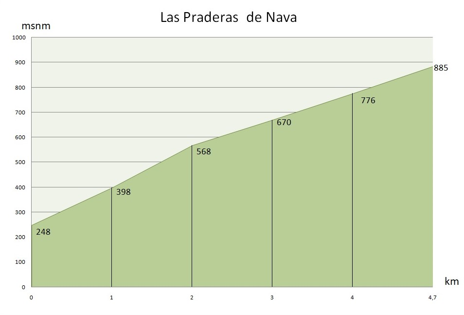 Perfil altimétrico de la subida a Las Praderas, en Nava, Asturias (España)